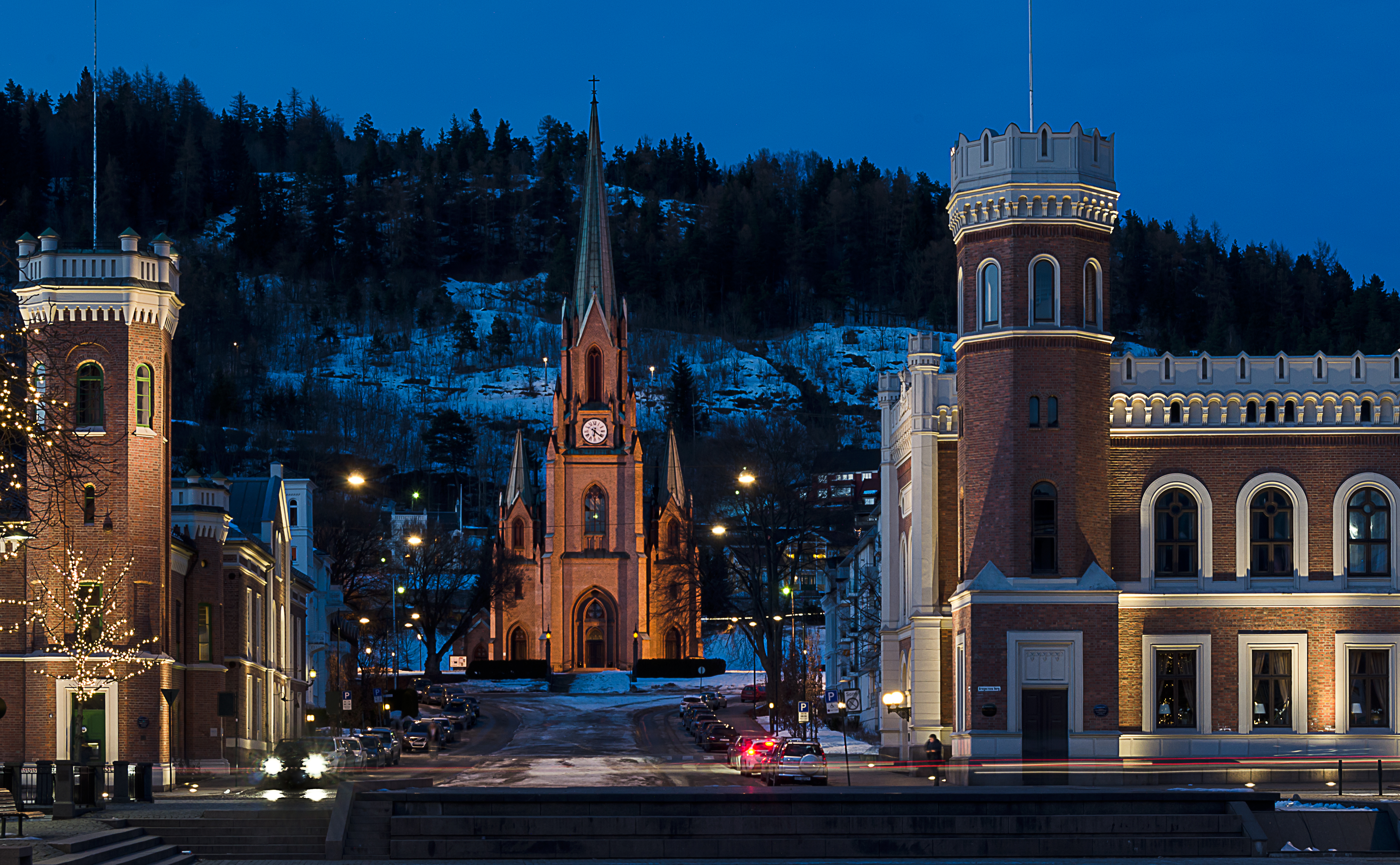 Bragernes kirke i Drammen fotografert i den blå timen